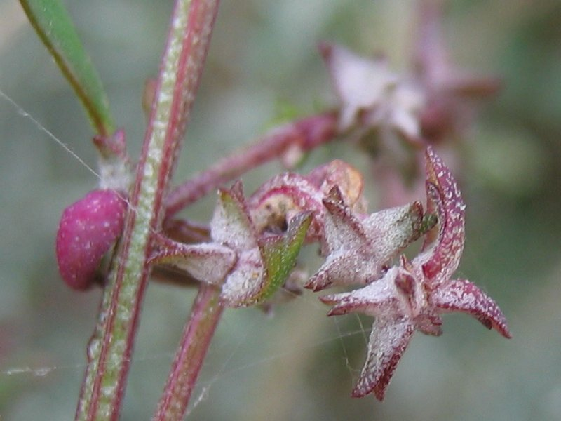 Spieß-Melde Atriplex prostrata, Wismarbucht